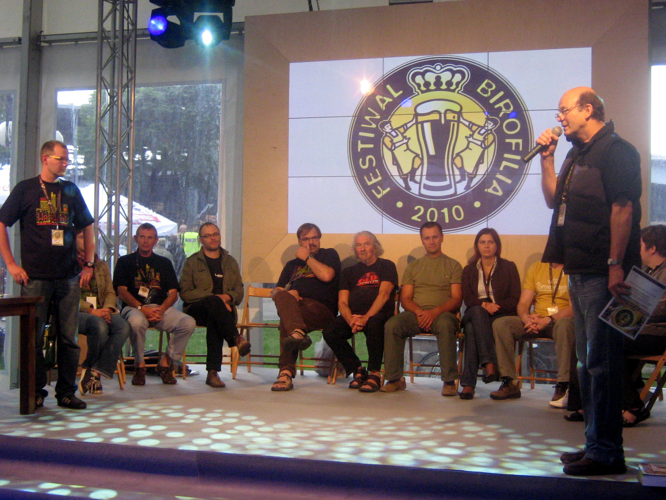 Ogłoszenie wyników. Z lewej: Ziemowit Fałat, z prawej Andrzej Sadownik, siedzą: członkowie jury